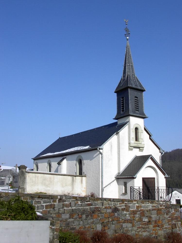 D'Kierch vu Selschent. Photo vum Paschtouer Francis Erasmy.